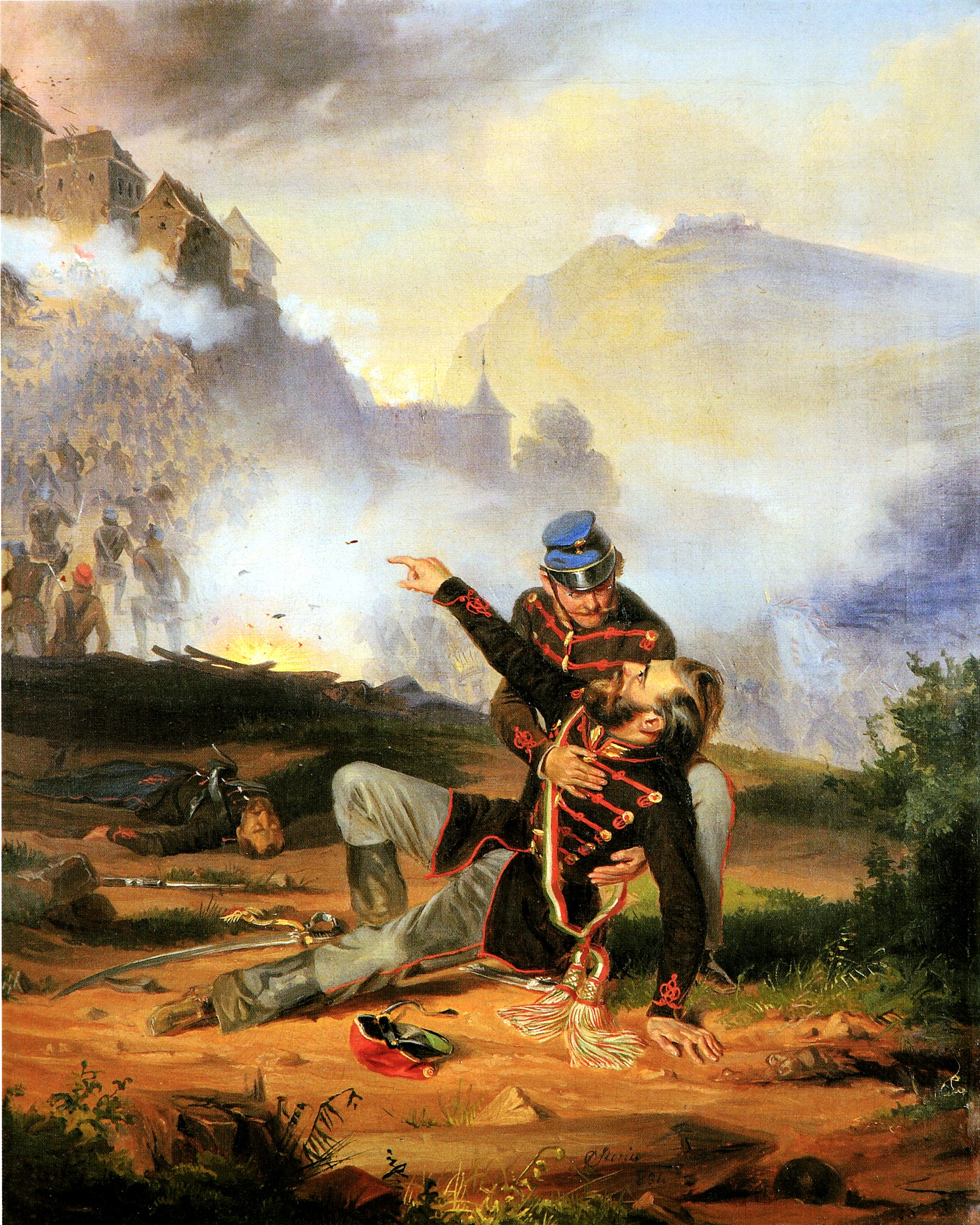 Hungarian: A sebesült honvéd (Buda ostroma–1849).